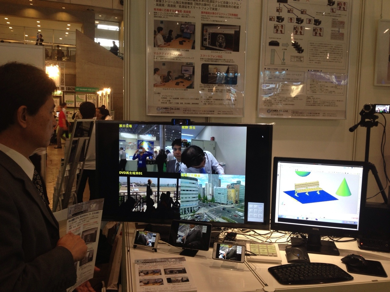 ENWA Company, Limited Exhibition 1